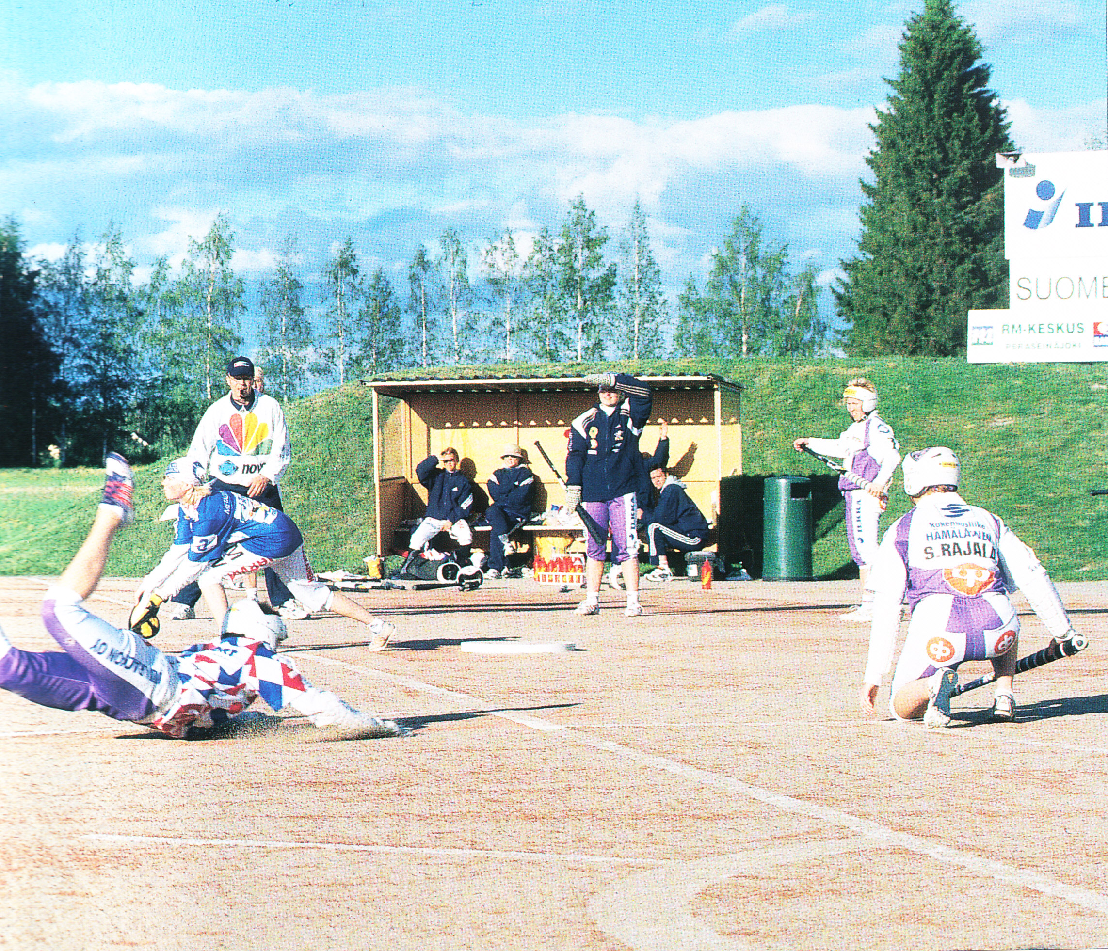 Kuva peton pelistä vuodelta 2000